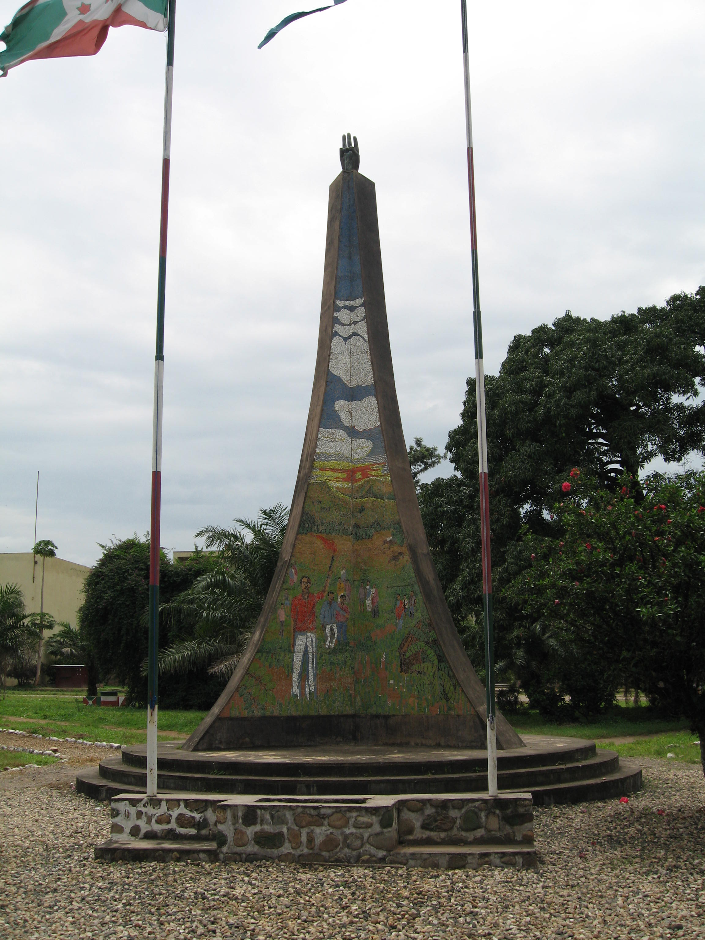 Revolution Square. Plaza de la Revolución. Place de la Revolution. Bujumbura, Burundi.